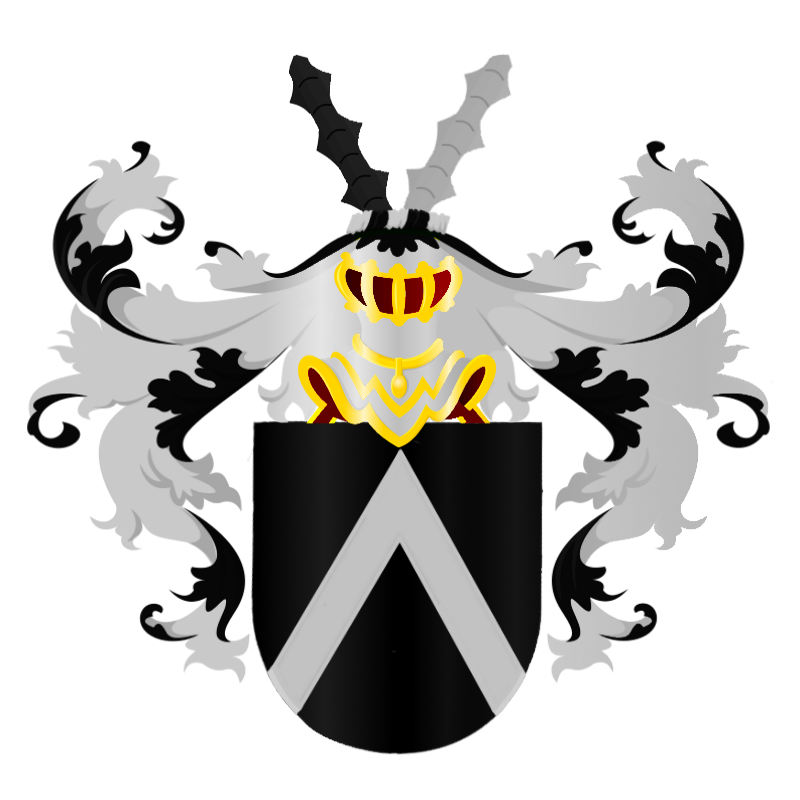 Een keper van zilver op een velt van sabel (zwart) met als helmteken twee afgekapte stokken. Waarvan de linker in sabel en de rechter in zilver.